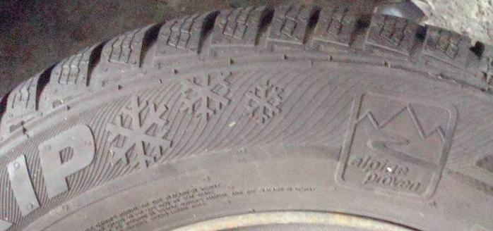 Symbolique figurant sur un pneu hiver